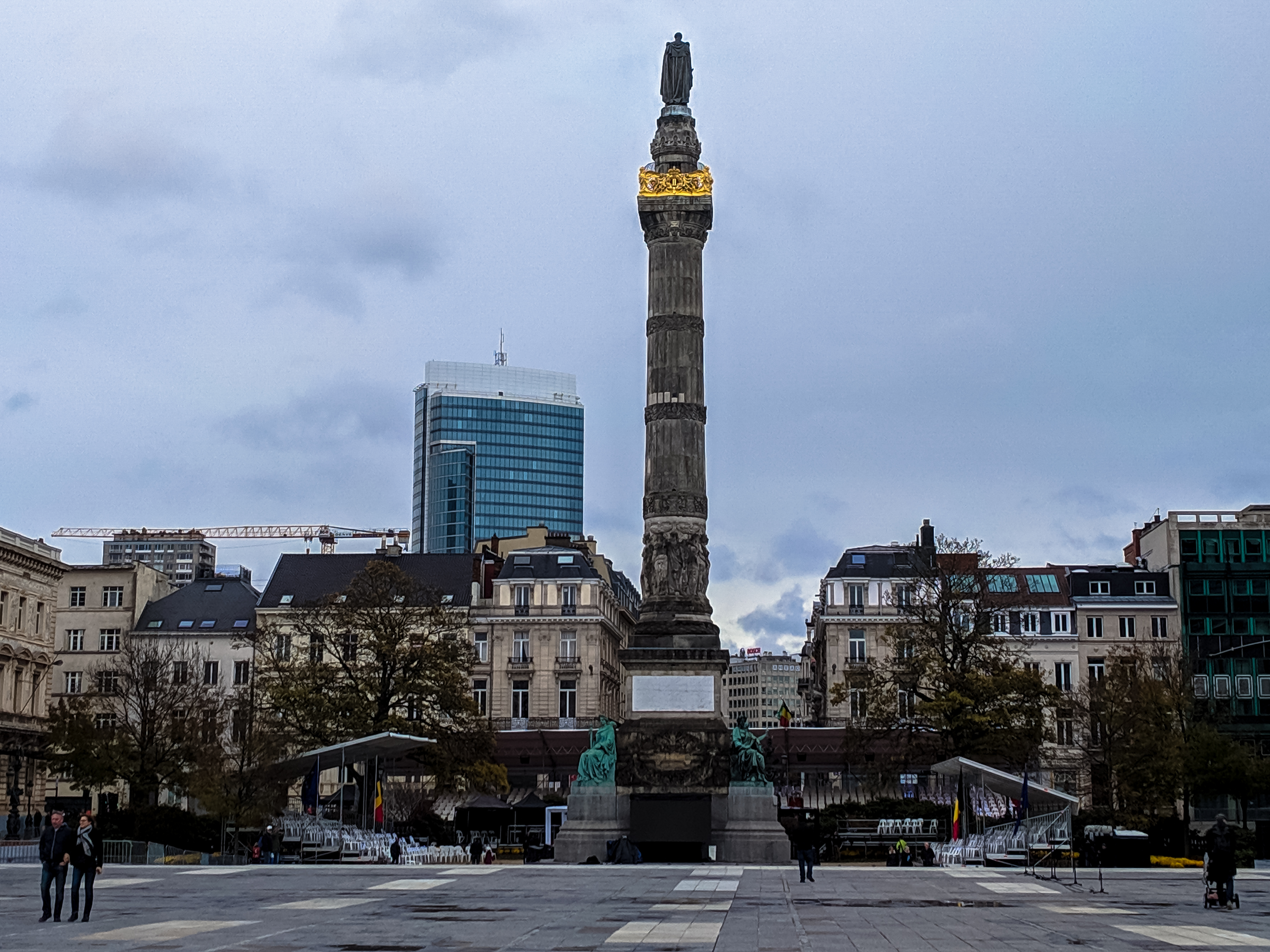 Colonne du Congrès in Brussels